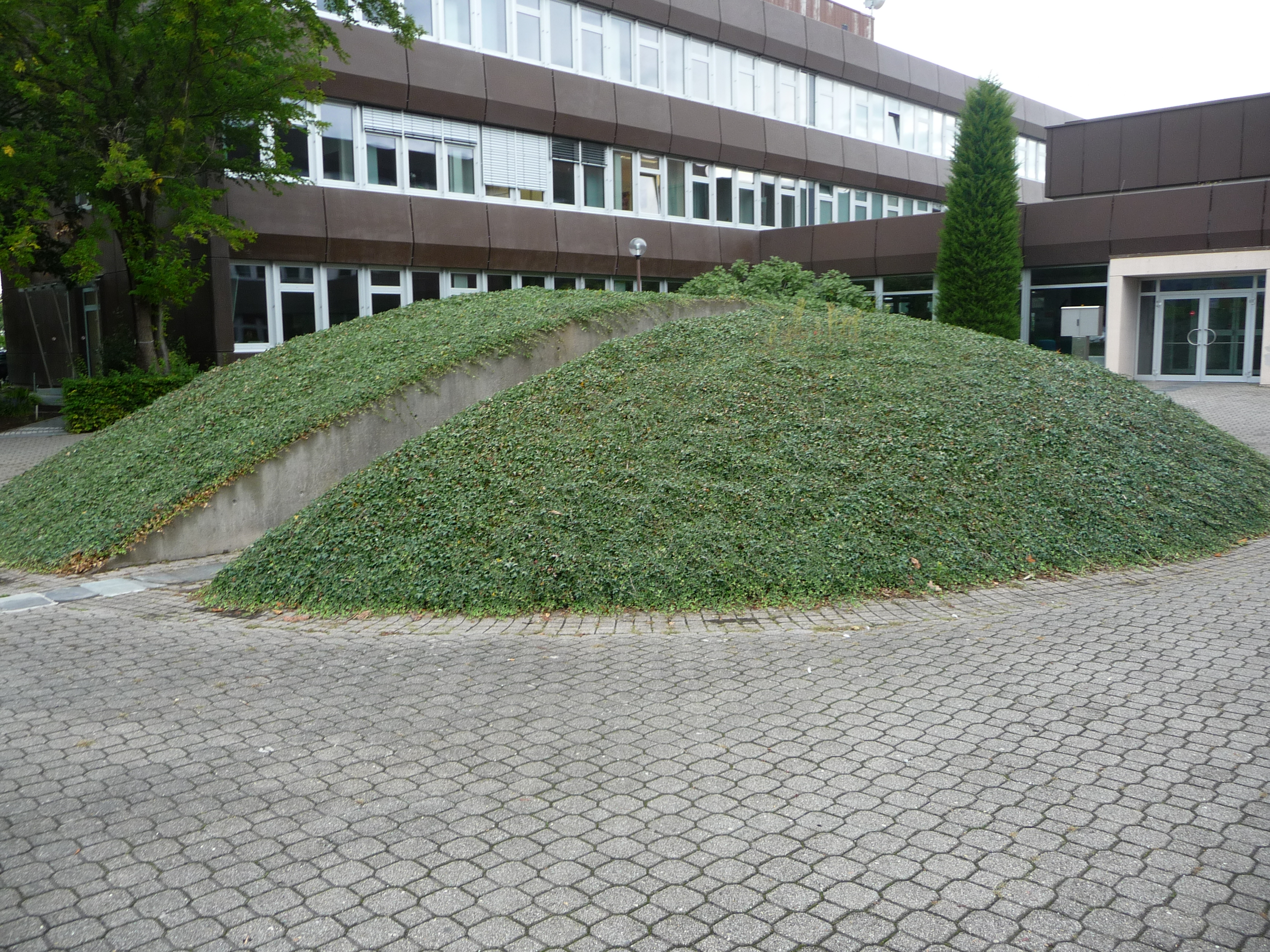 Dienstleistungszentrum Ländlicher Raum, früher Forschungsanstalt für Weinbau und Gartenbau bei Neustadt an der Weinstraße